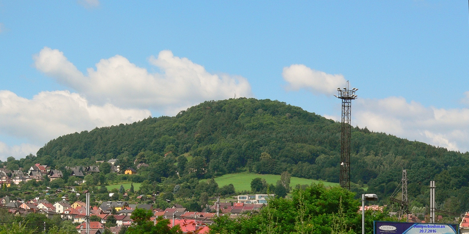 Pohled na Popovický vrch z Podmokel